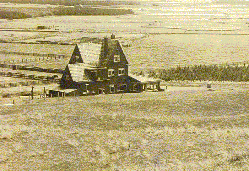 Foto pension Op Duin